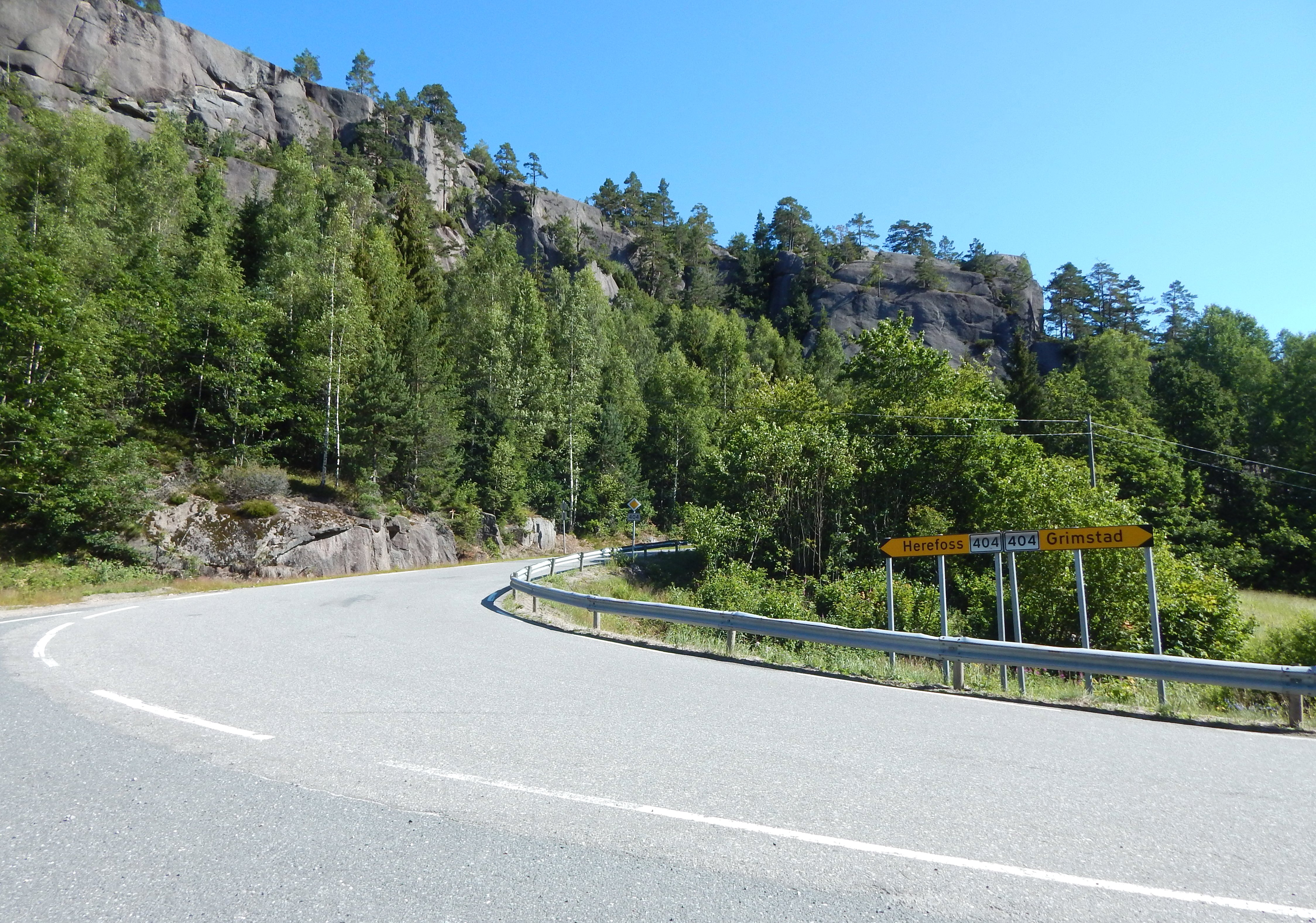 Primær fylkesvei 404 ved Grøsle i Grimstad kommune